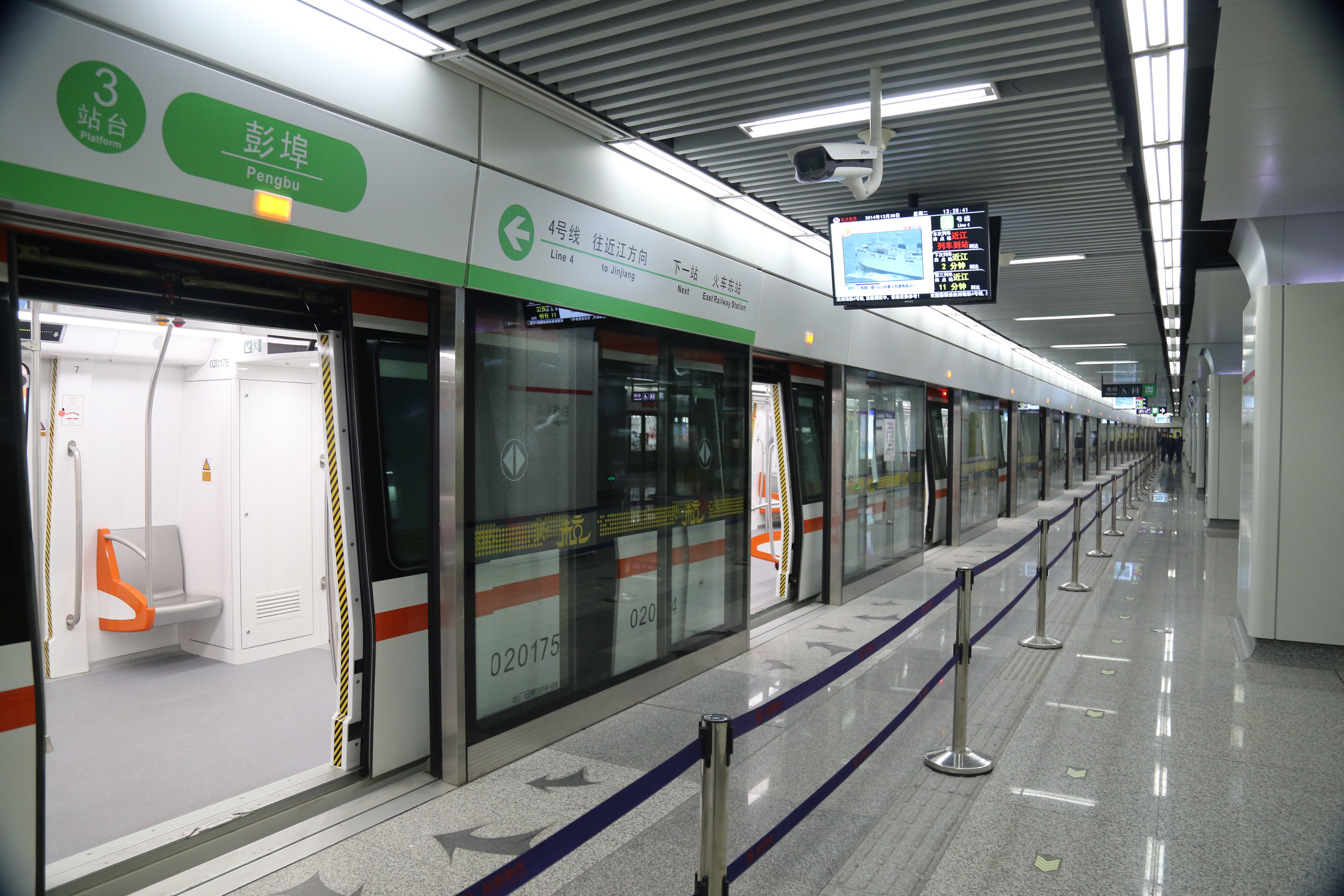 2号线橙色列车停靠于彭埠站